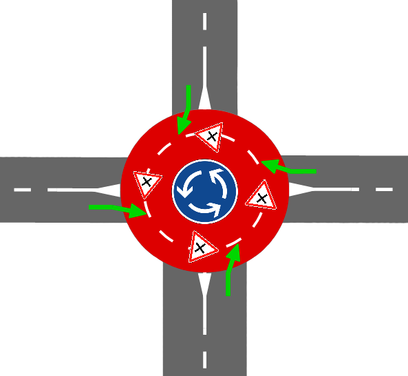 Schéma montrant les règles de priorité d'un rond-point.